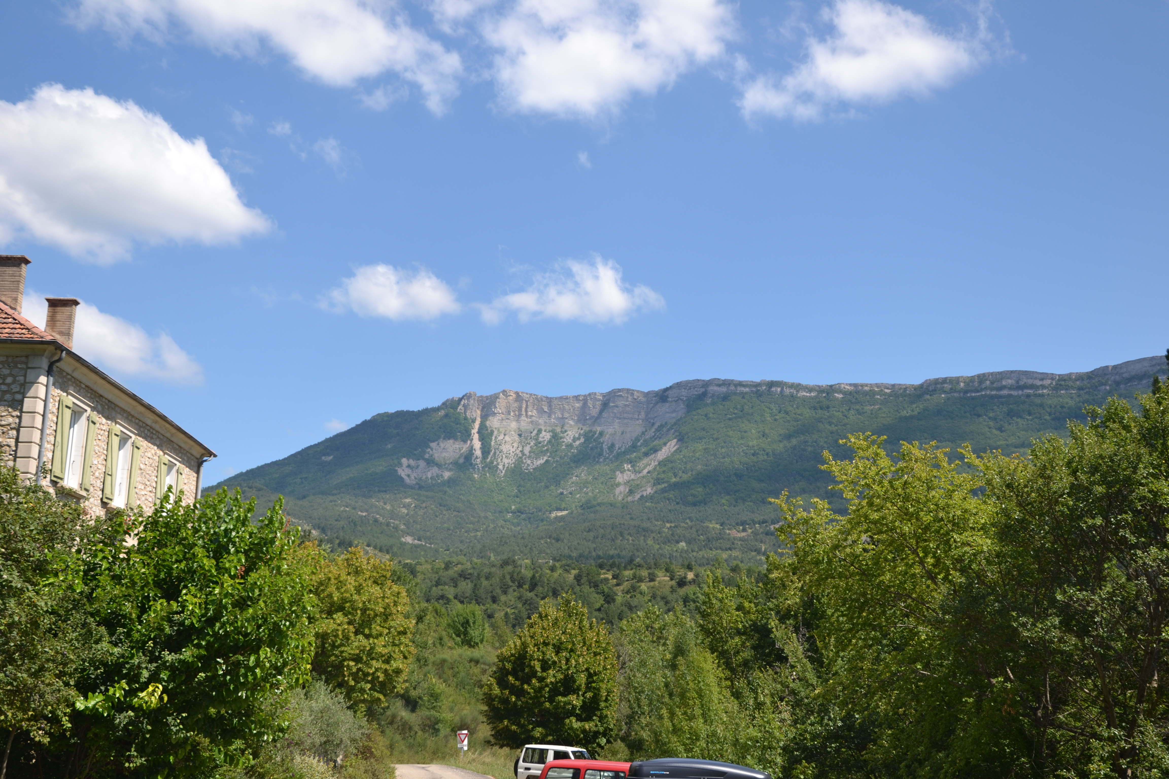 vue sur la Montagne de Raton depuis le village de Cornillac